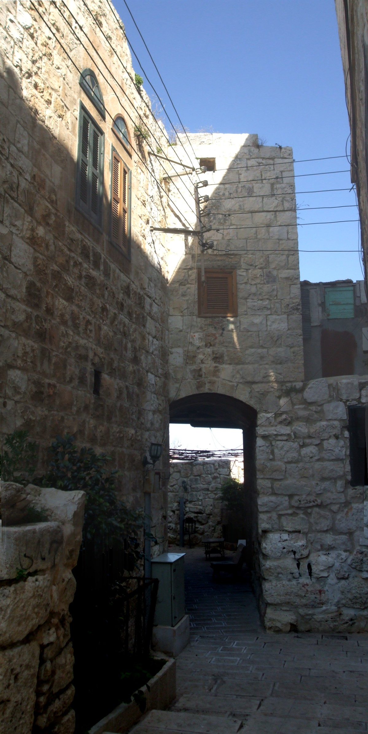 ممرات البلدة القديمة